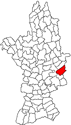 Categorie:Hărţi ale judeţului Olt